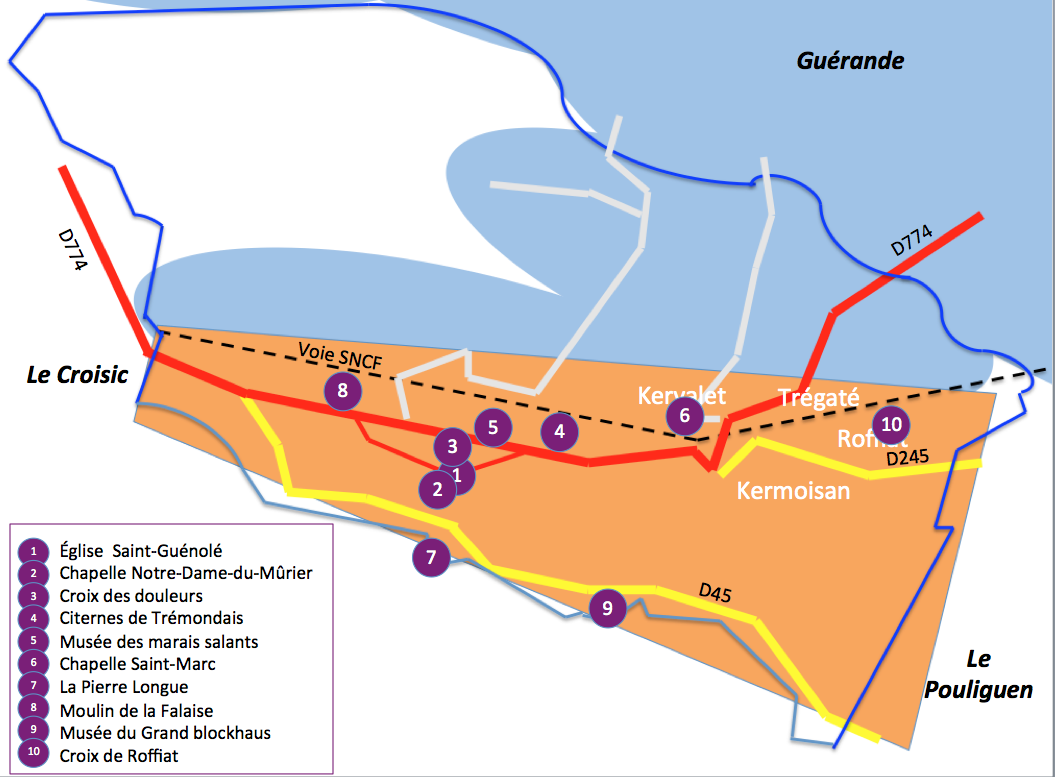 Batz-sur-Mer - Emplacement des monuments et lieux d'intérêt